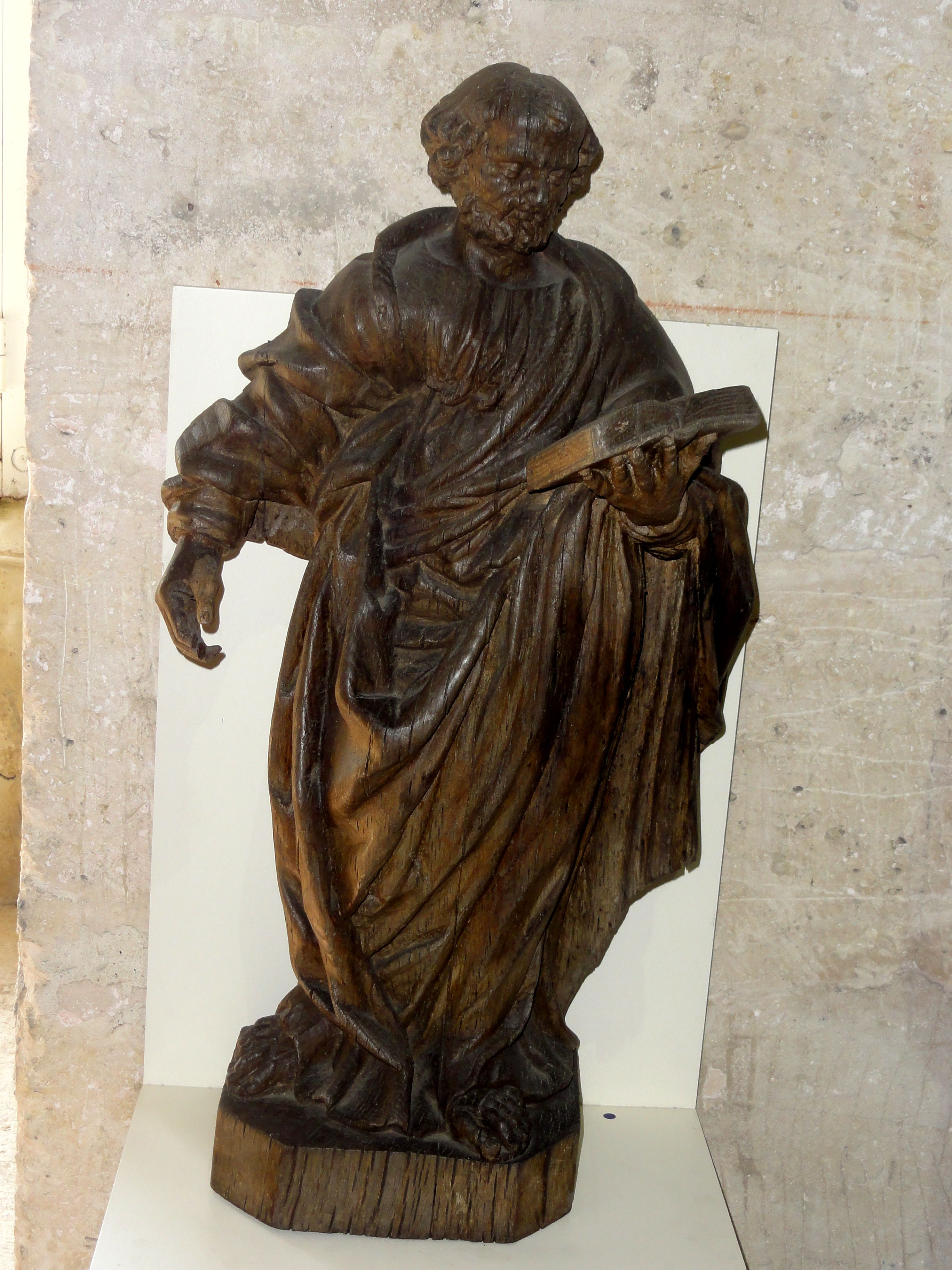 Statue de saint Pierre, XVIe s.